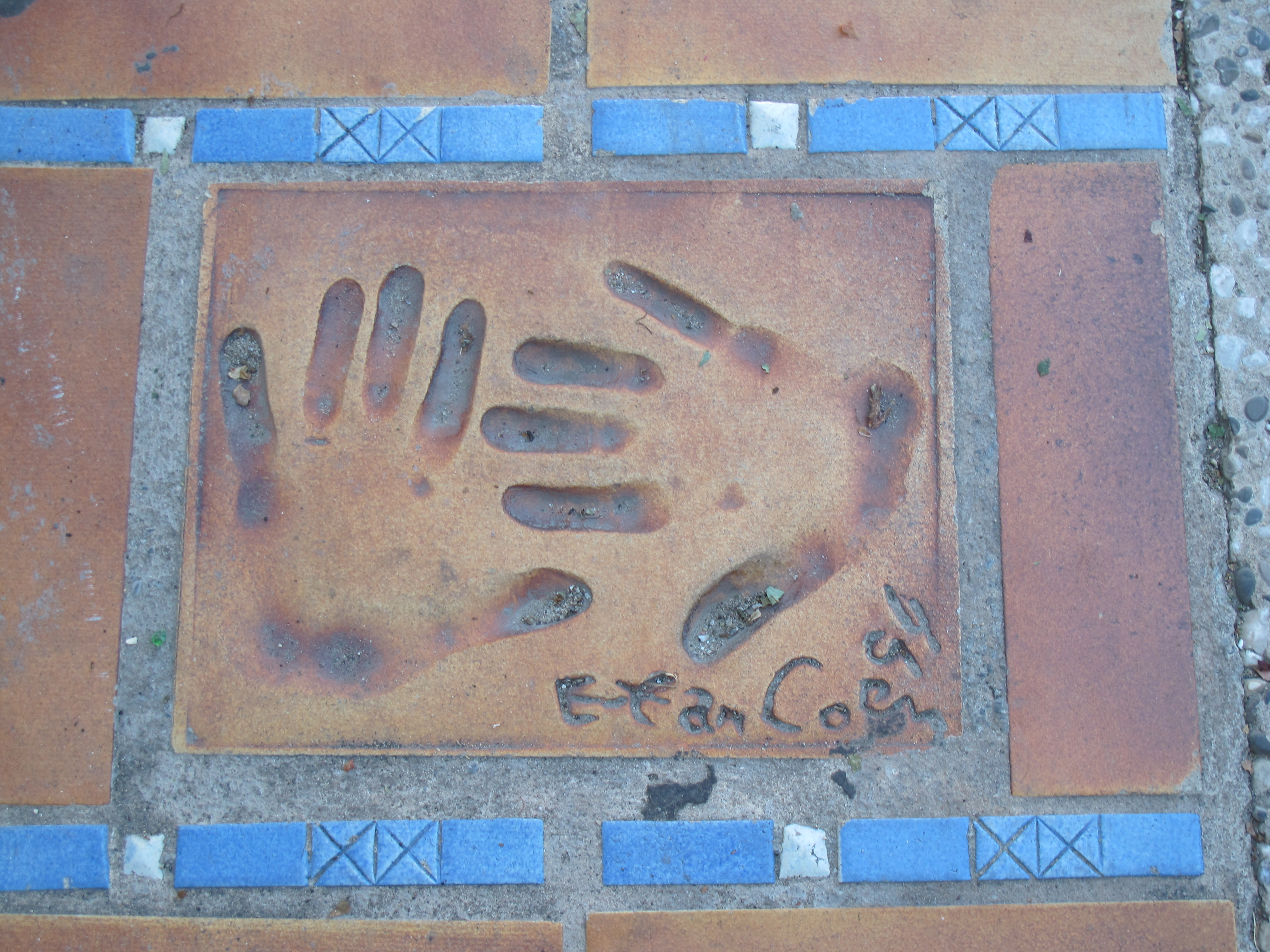 Le impronte di Ethan Coen a Cannes.